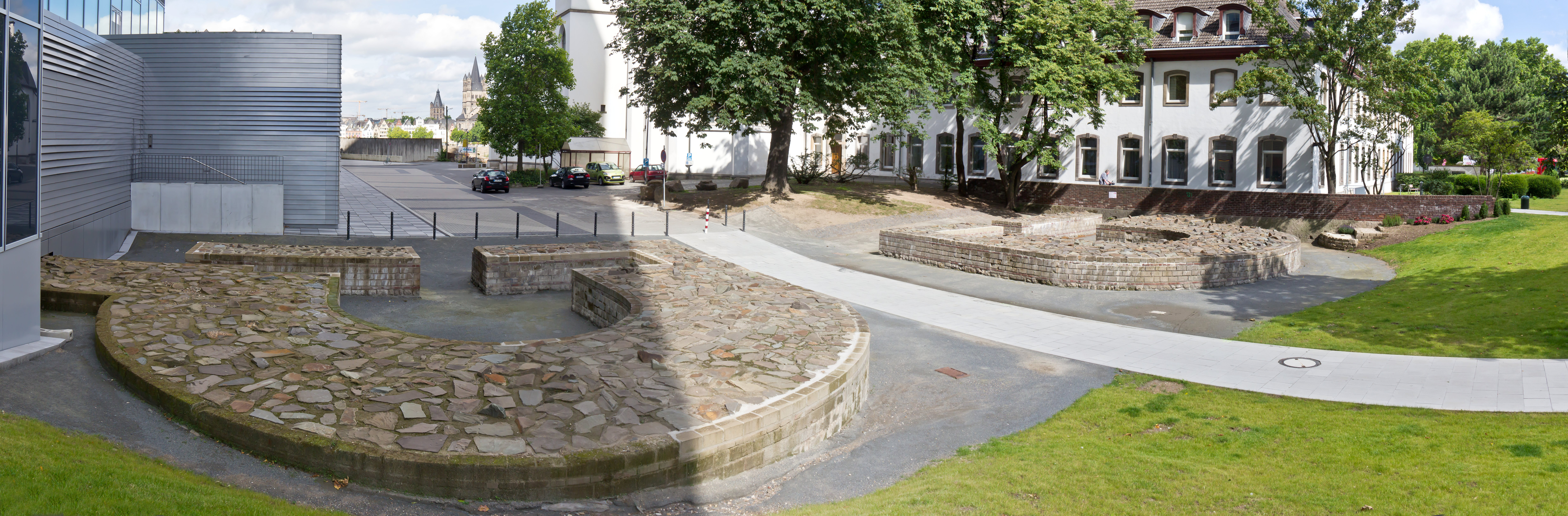 Kastell Deutz - Reste vom Osttor